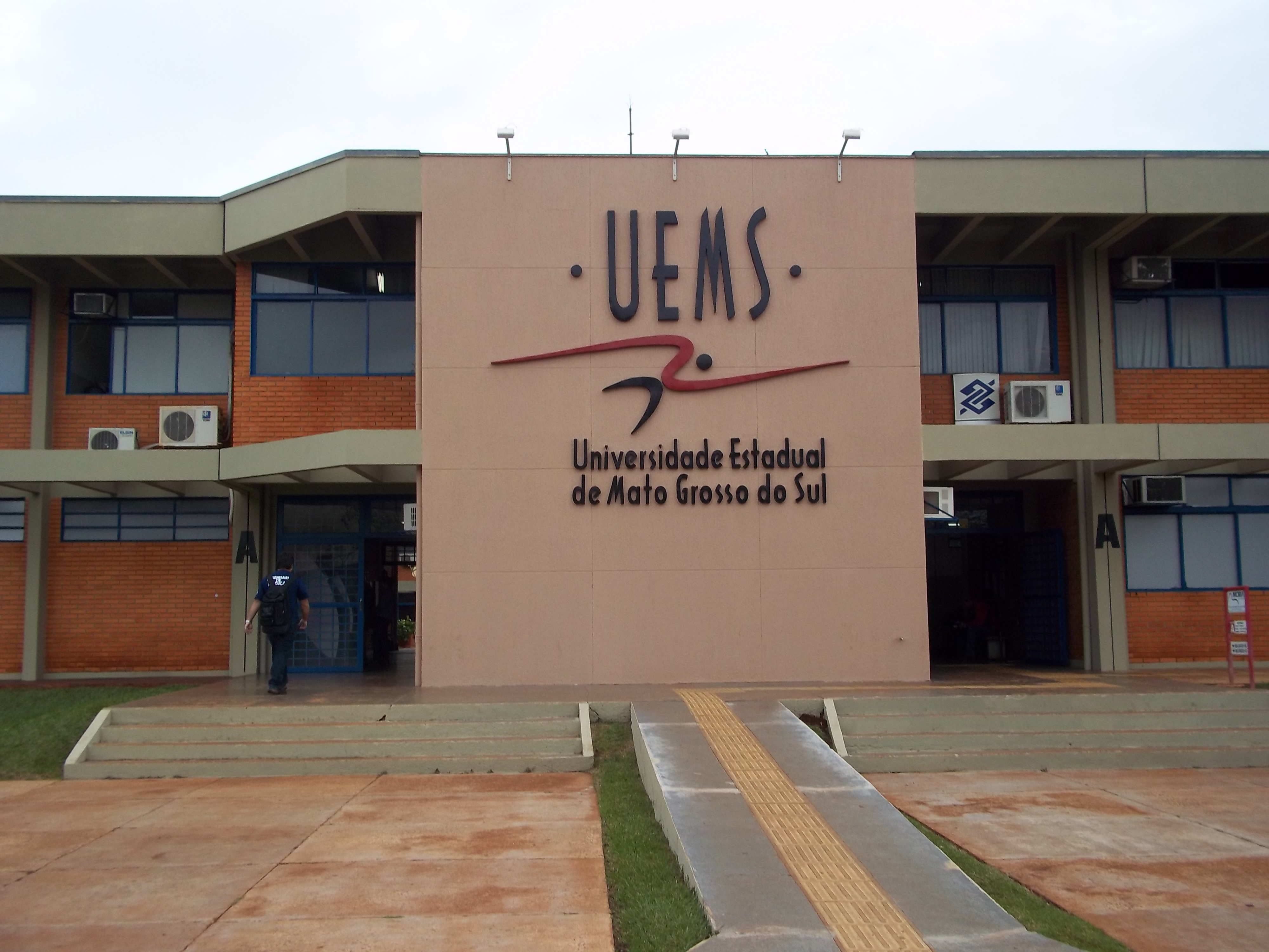 Fachada principal da Universidade Estadual de Mato Grosso do Sul, na cidade de Dourados.